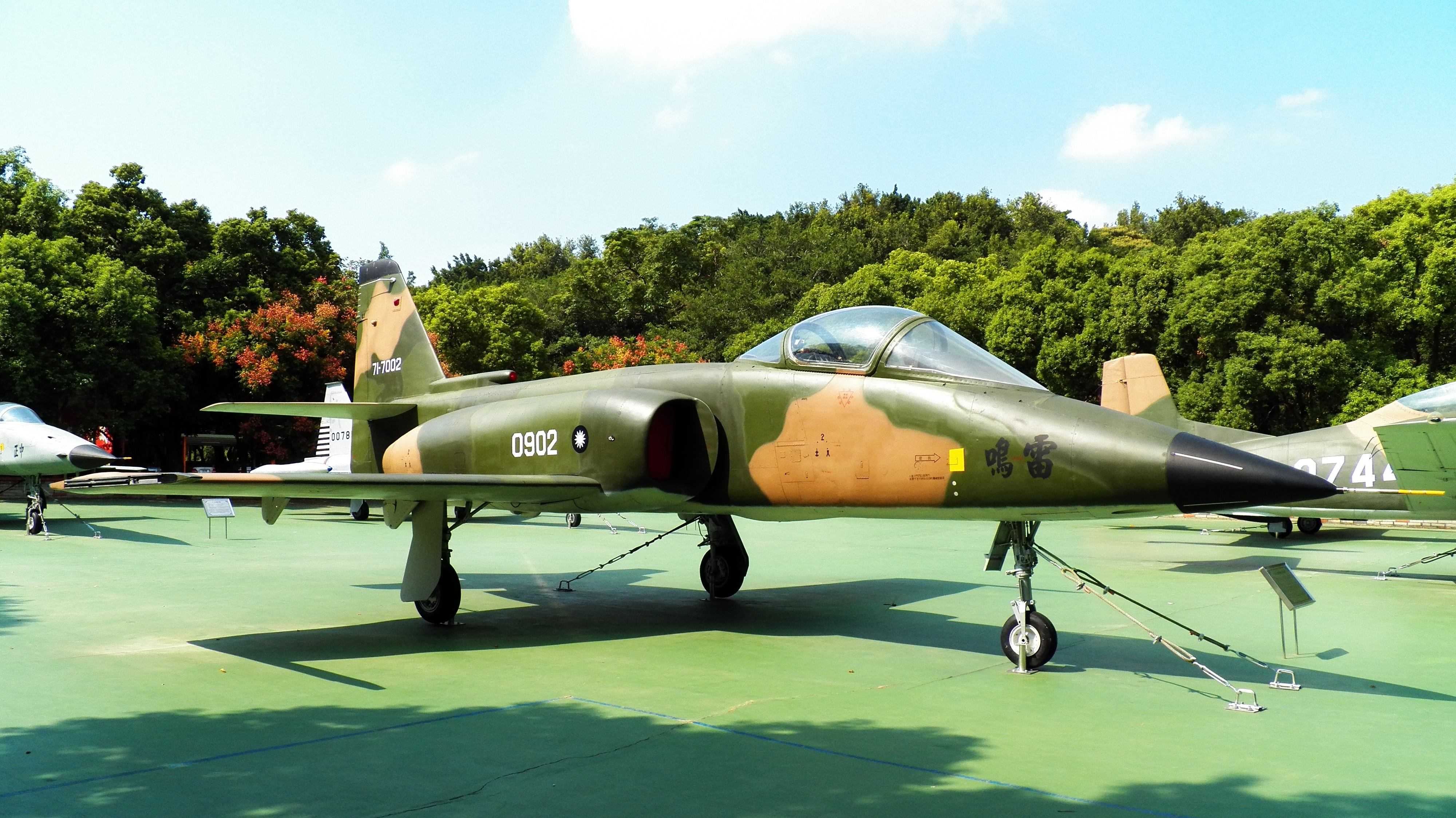 中文（台灣）: 成功嶺展示的XA-3雷鳴號原型二號機，攝於2012年營區開放活動。